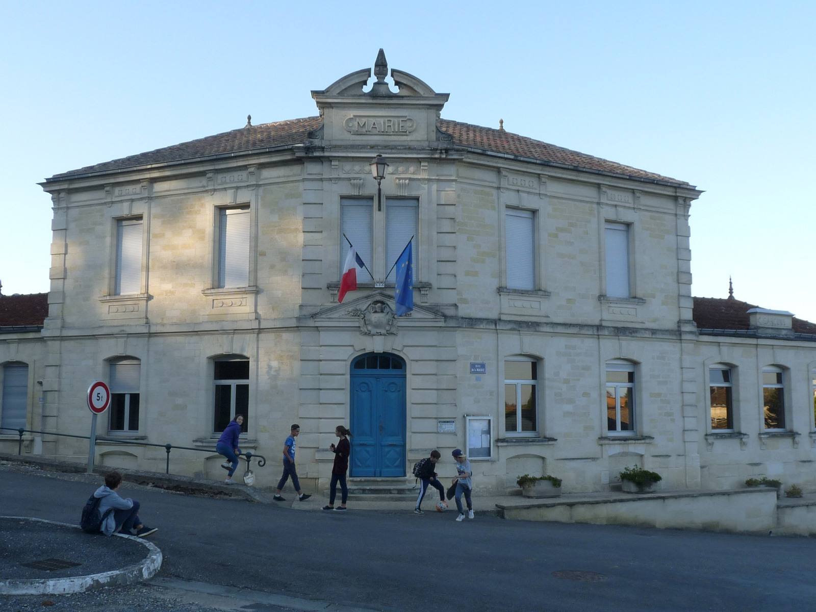 Mairie de Cabara, Gironde, France